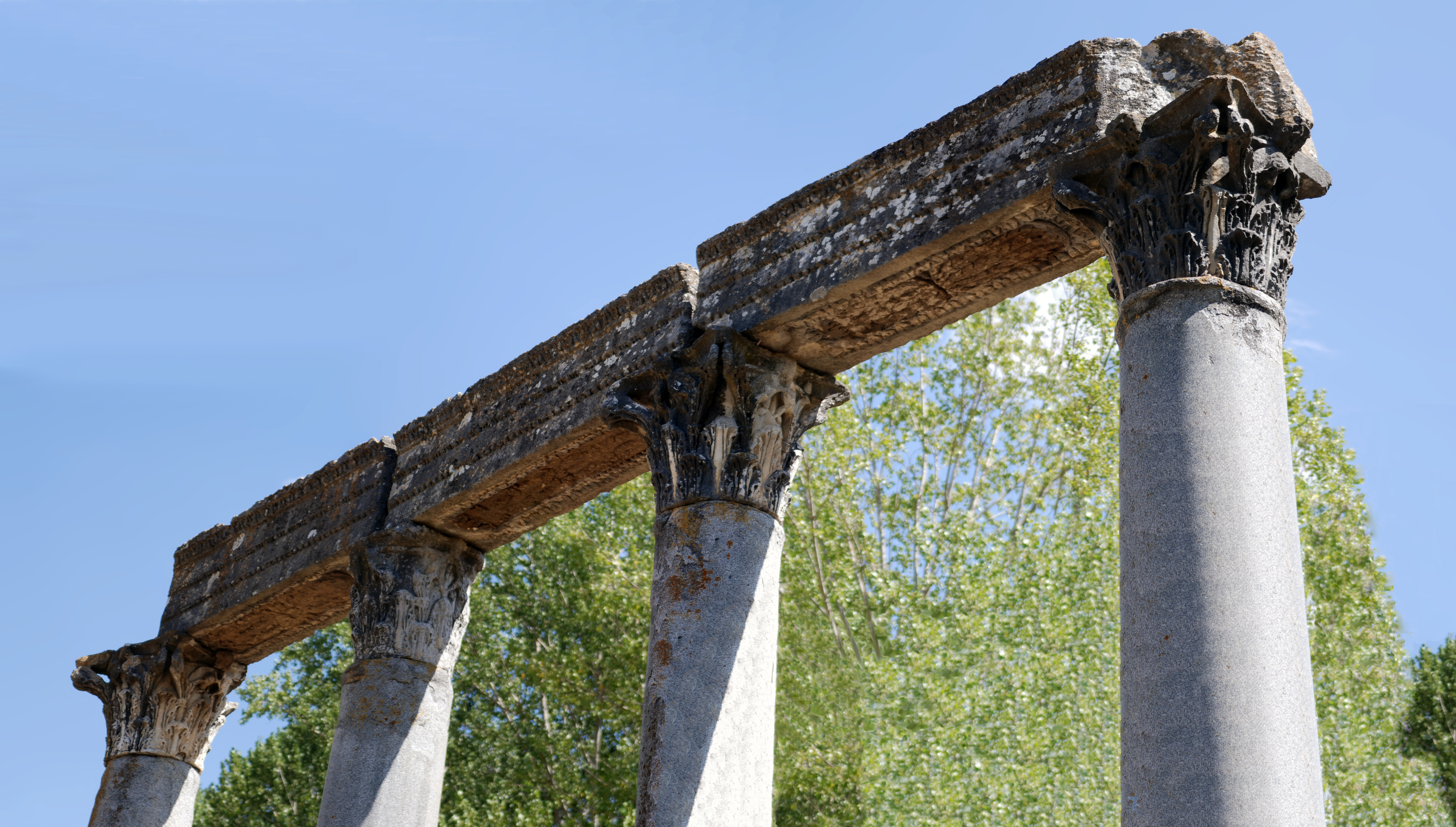 Blick auf den Römischen Tempel in Riez, (France)